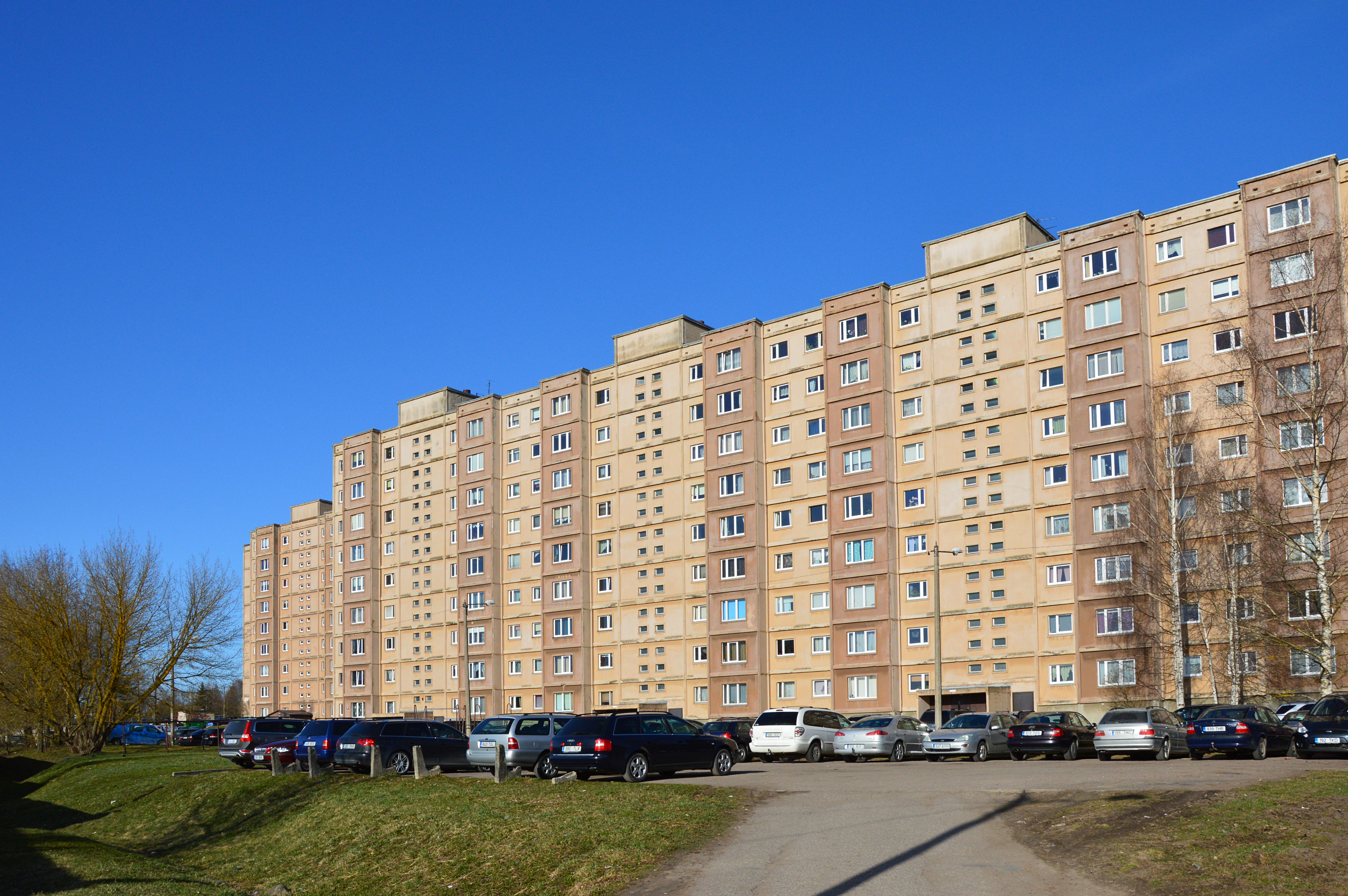 Anne tänav 80, Tartu.